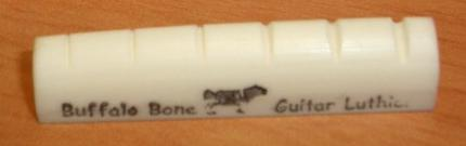 木吉他上弦枕